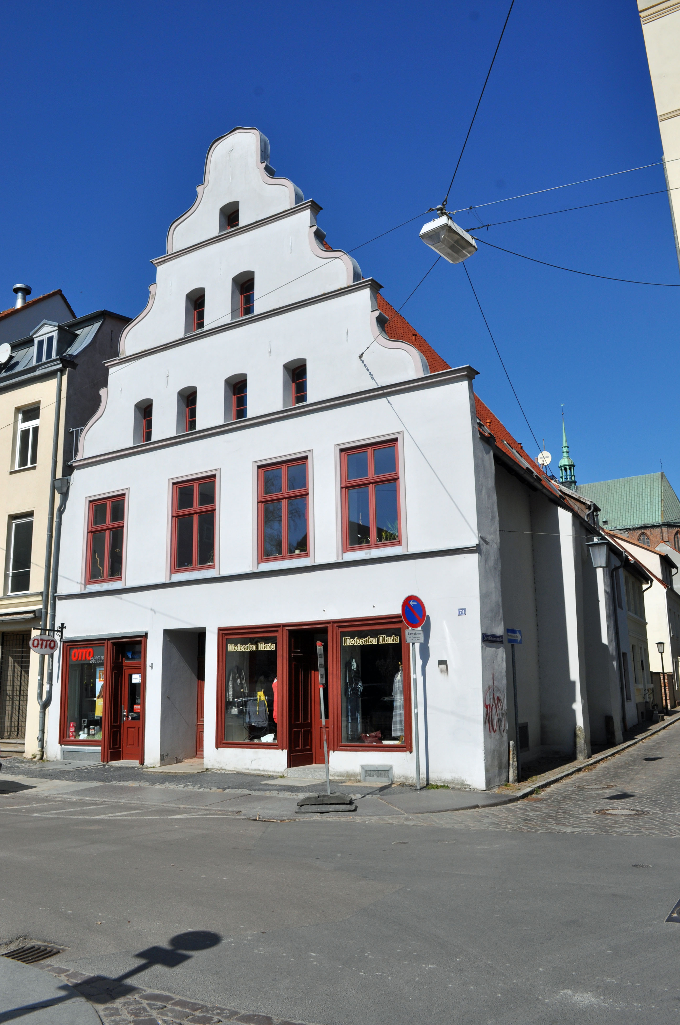 Gebäude bzw. Gebäudedetail in Stralsund. Straße und Hausnummer siehe Dateiname.